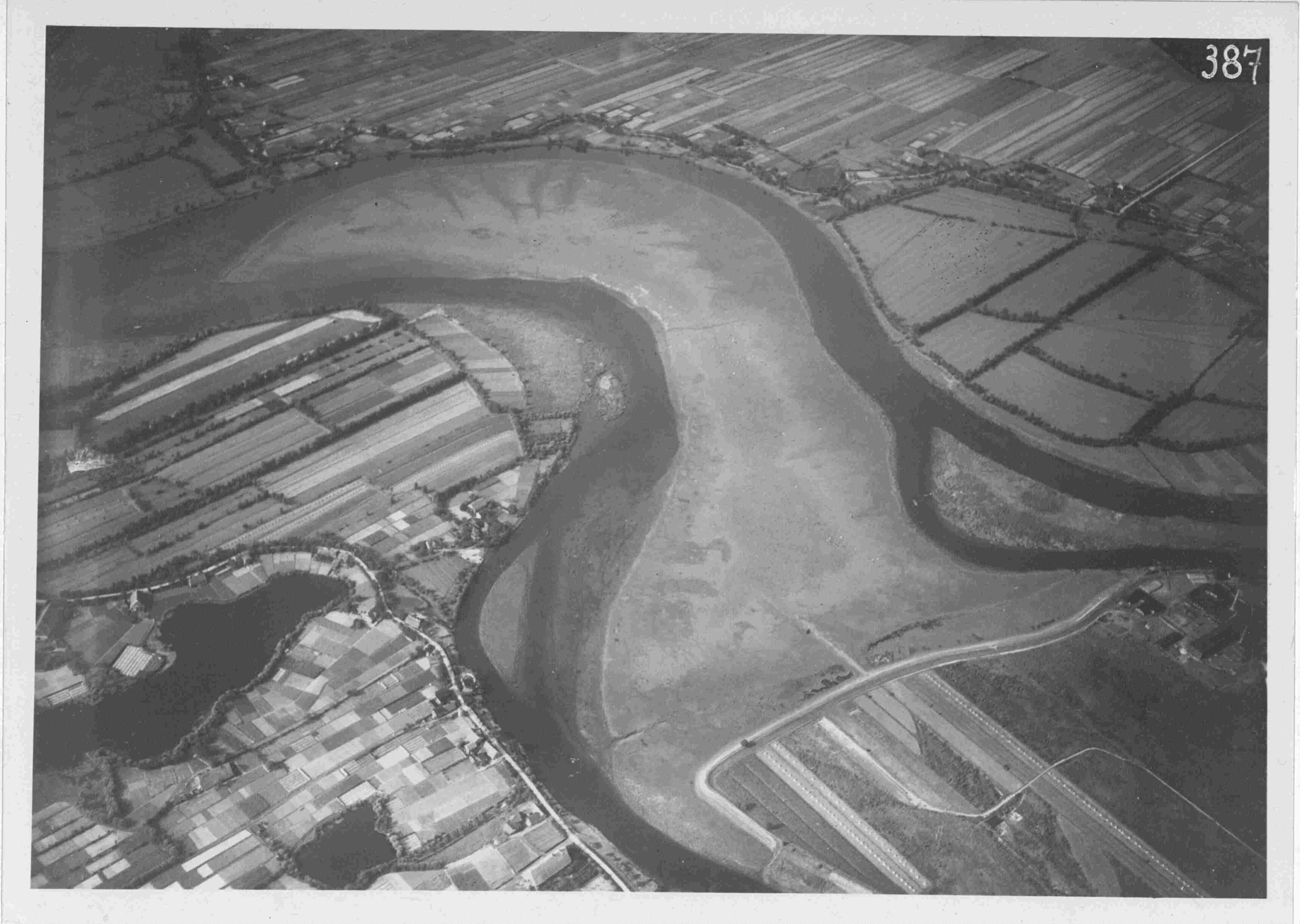 Schraegbildaufnahme "Die Hohe"